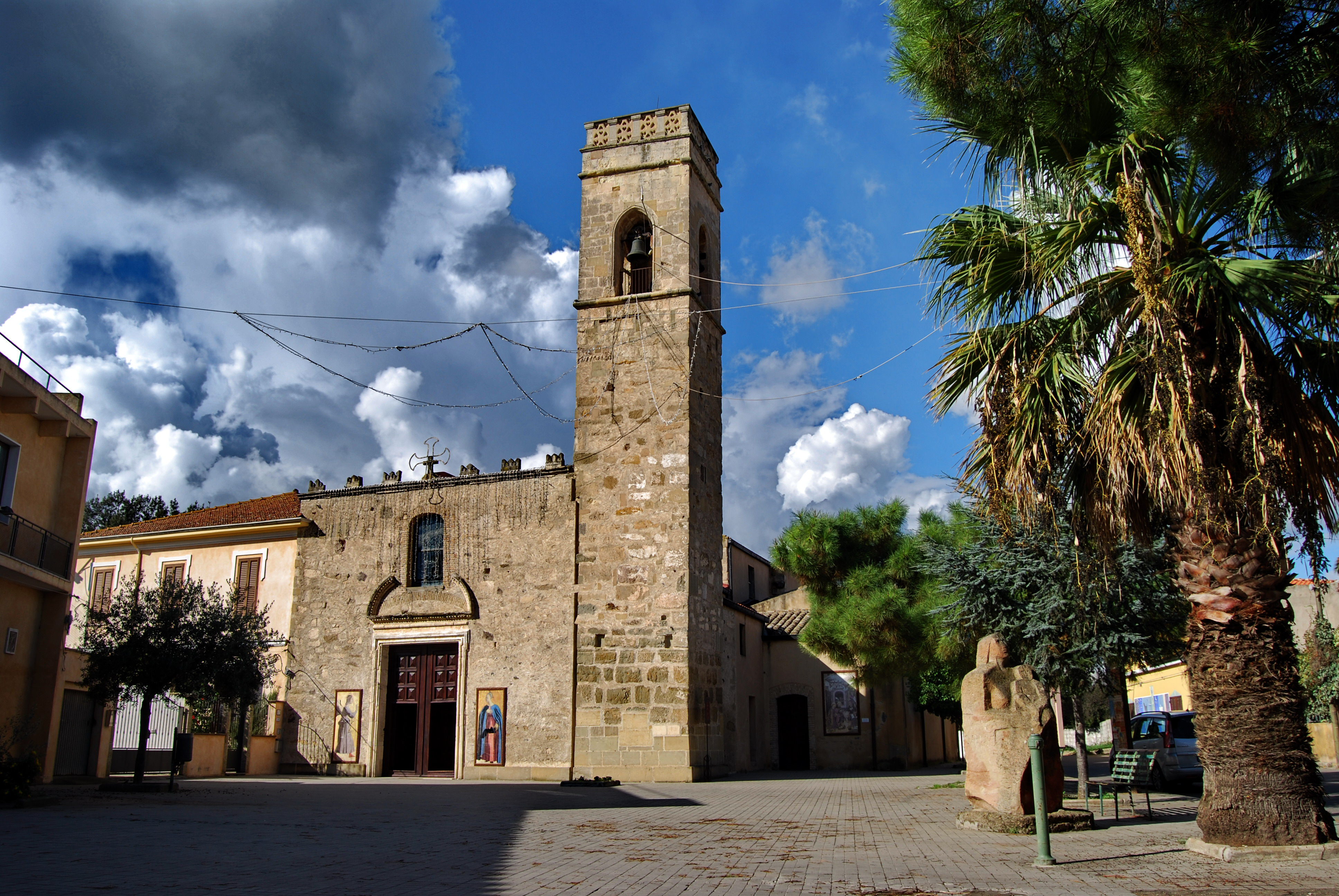 Chiesa di San Sperate